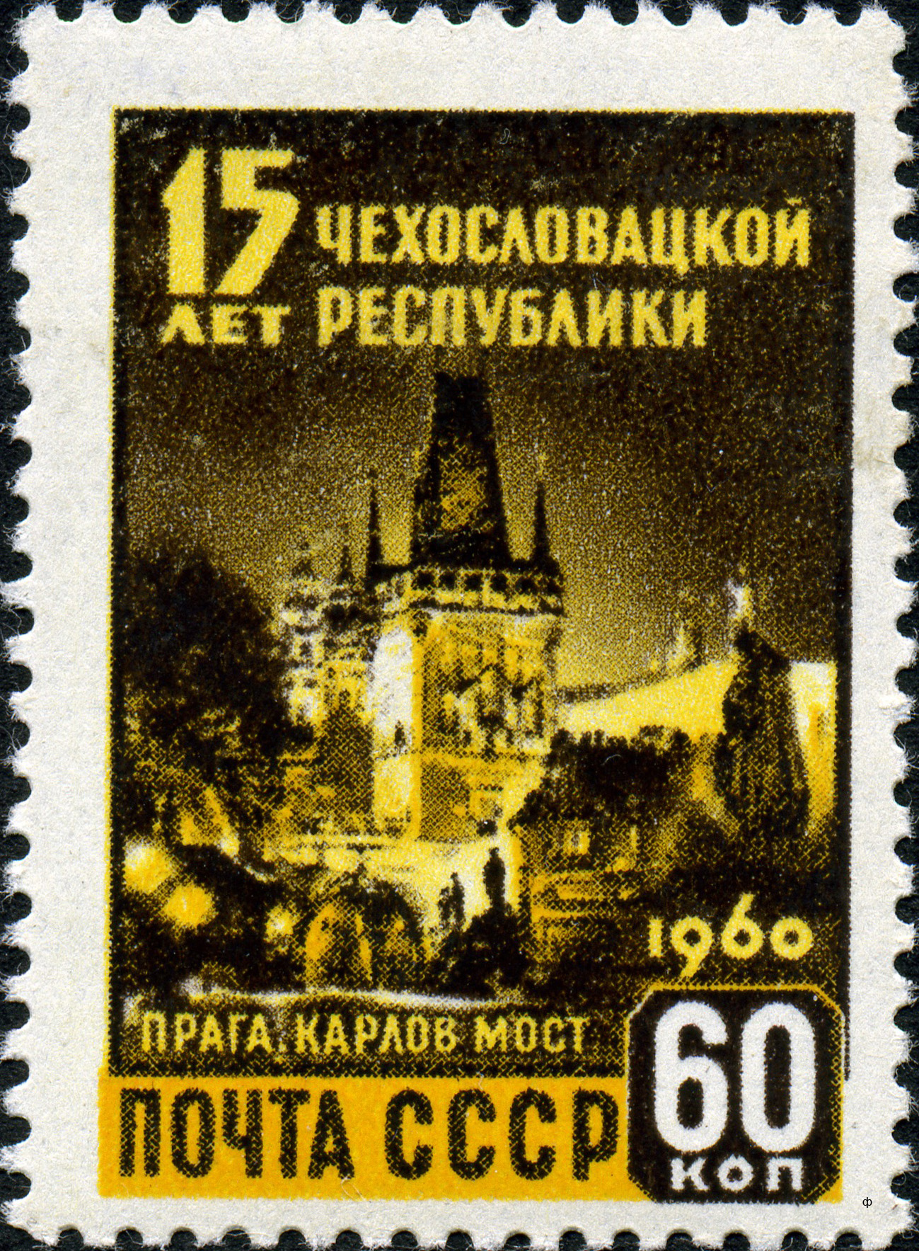 Марка СССР